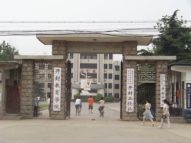 2008年拍摄